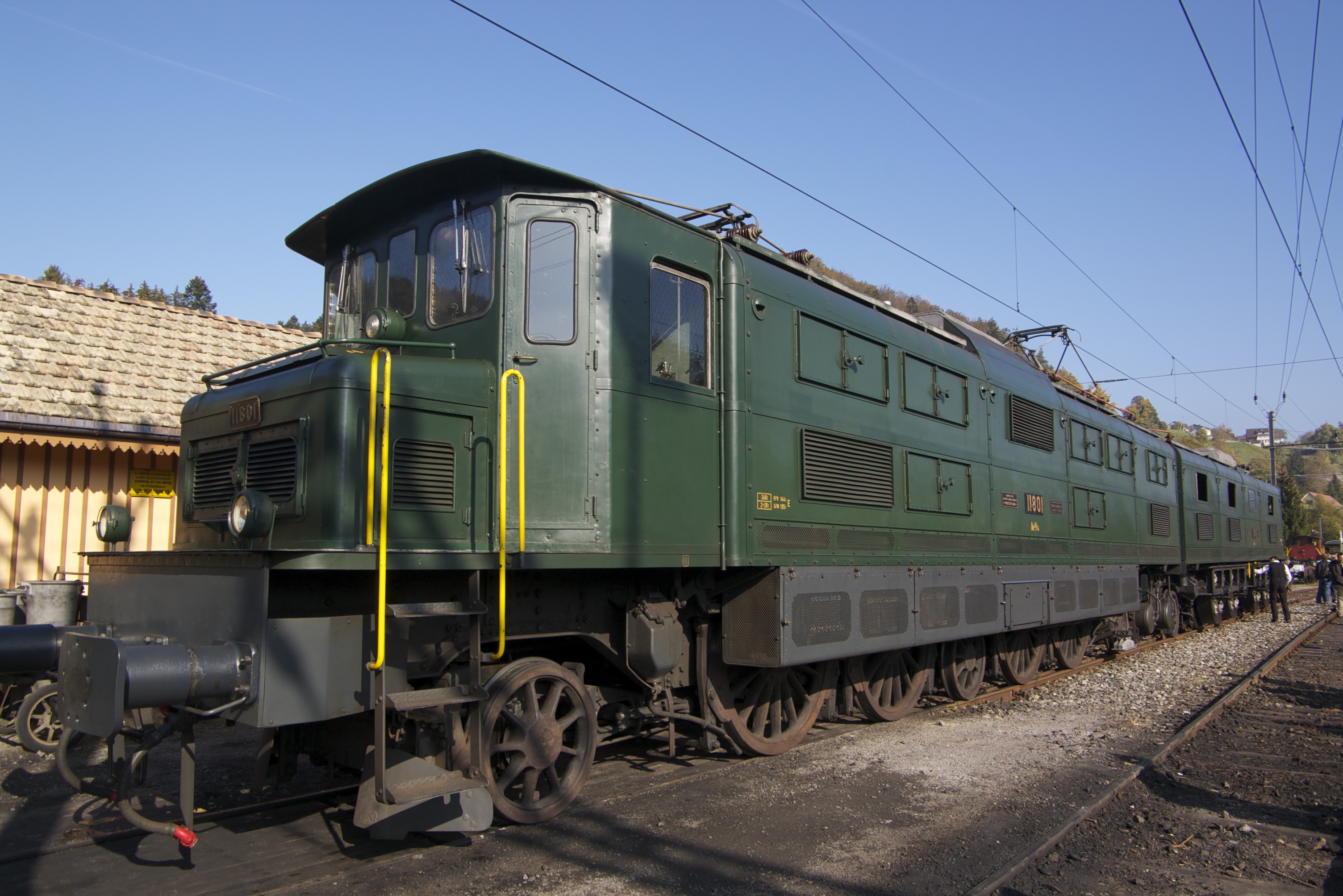 Locomotive Ae 8/14 11801 im Bahnhof Bauma.